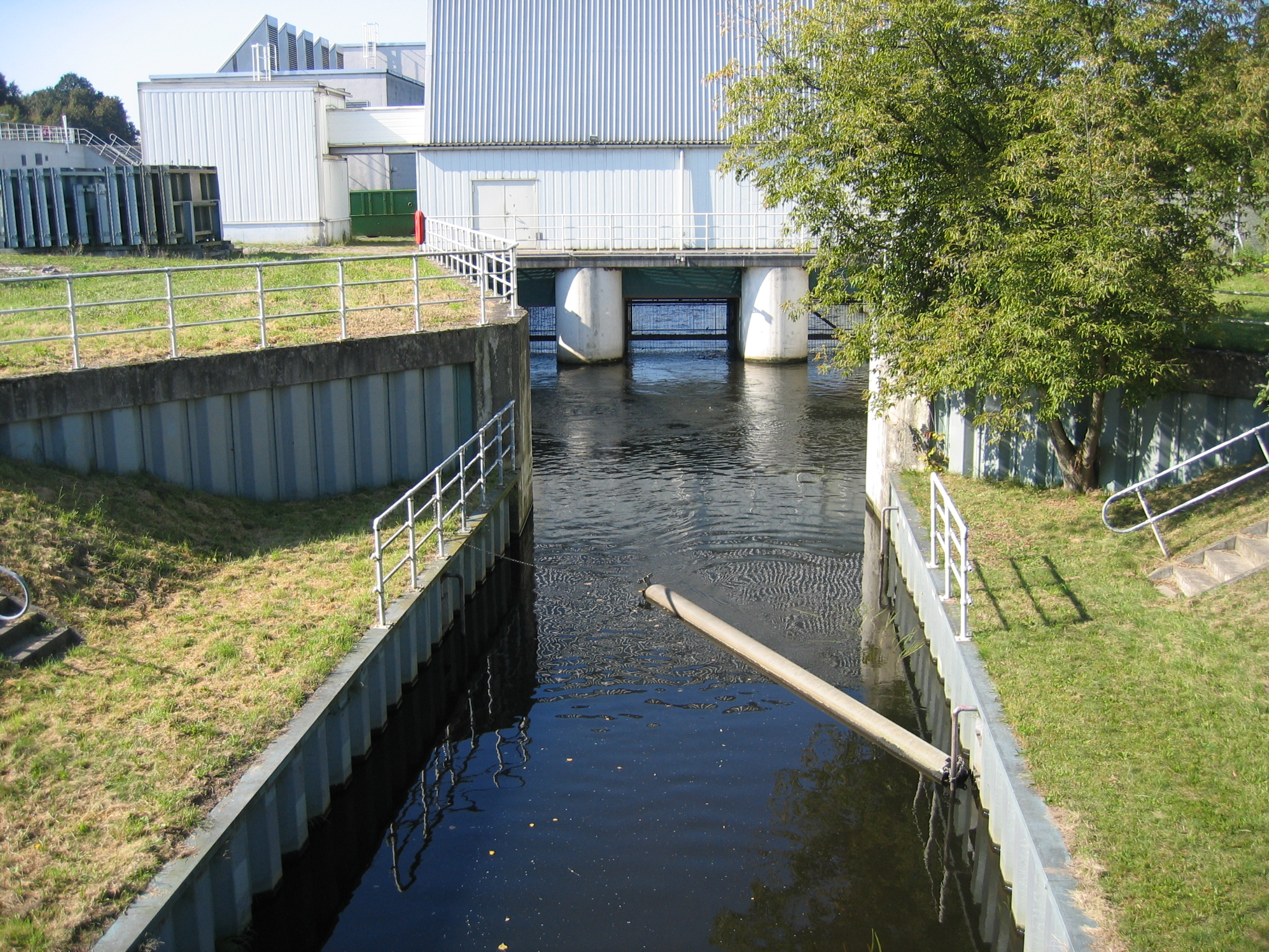 Nordgraben in Berlin-Tegel